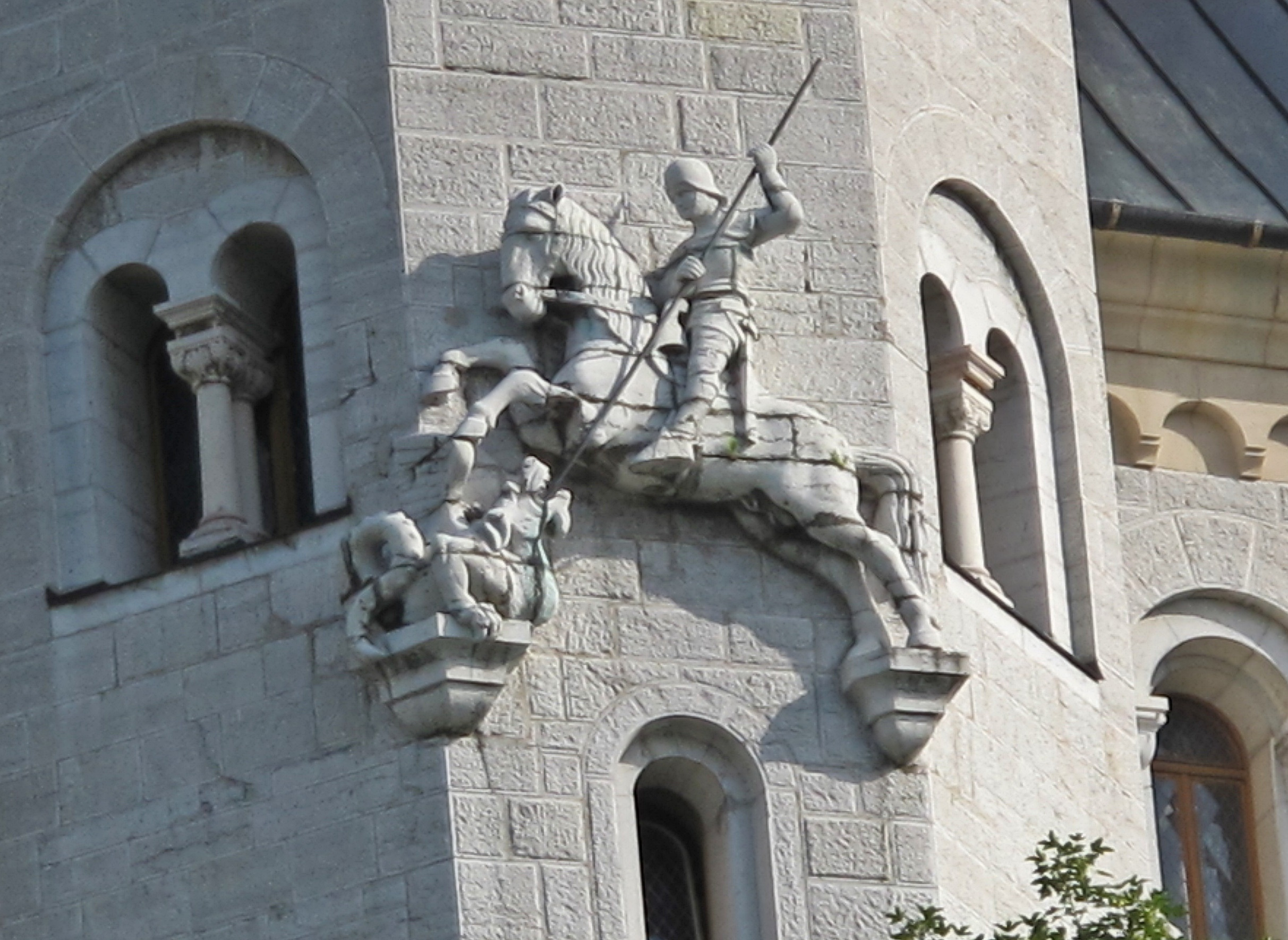 St. Georg an Schloss Neuschwanstein, geschaffen von Philipp Perron